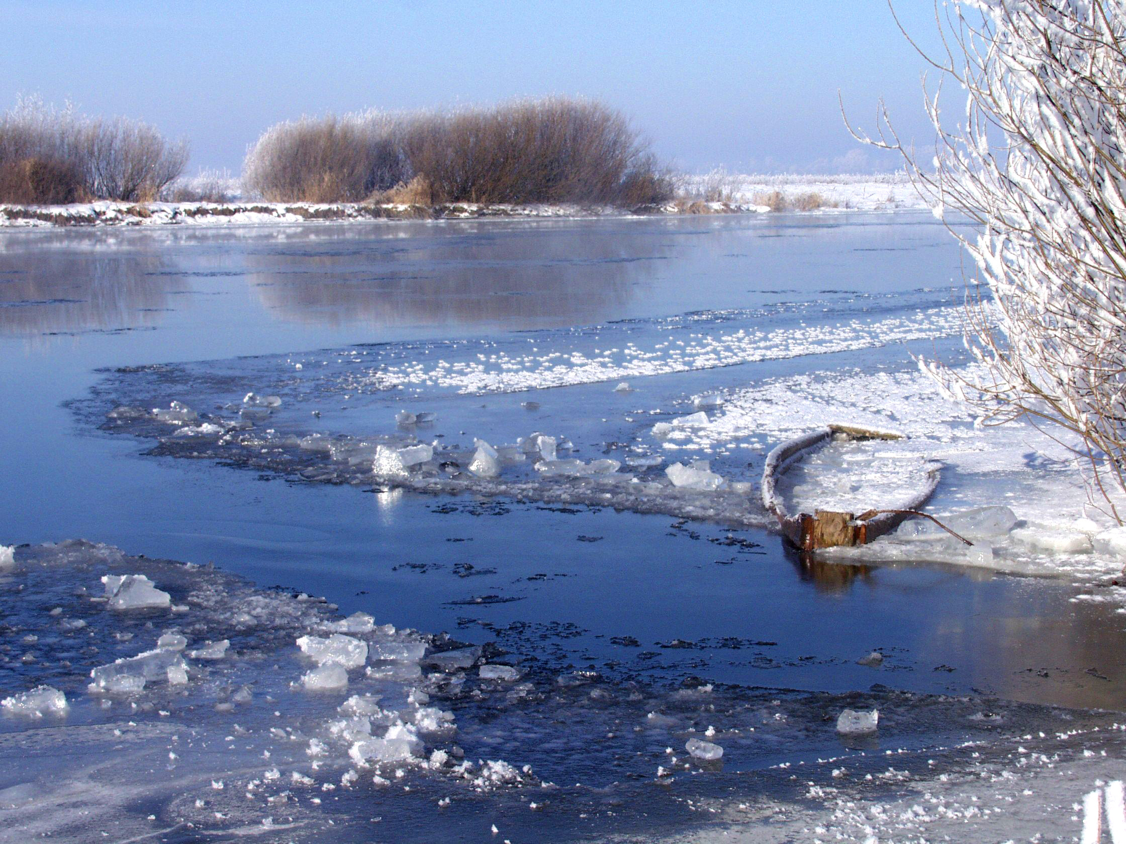 Река Стырь в Кузнецовске, Ровенская область, Украина. Зима.